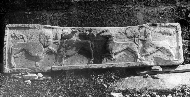 Gravmonument av sandsten med djurfigurer i relief samt runskrift. Troligen utförd av stenmästaren Sigraf under 1100-talet senare hälft. Kategori: (09) GravarGravmonument av sandsten med djurfigurer i relief samt runskrift. Troligen utförd av stenmästaren Sigraf under 1100-talet senare hälft.